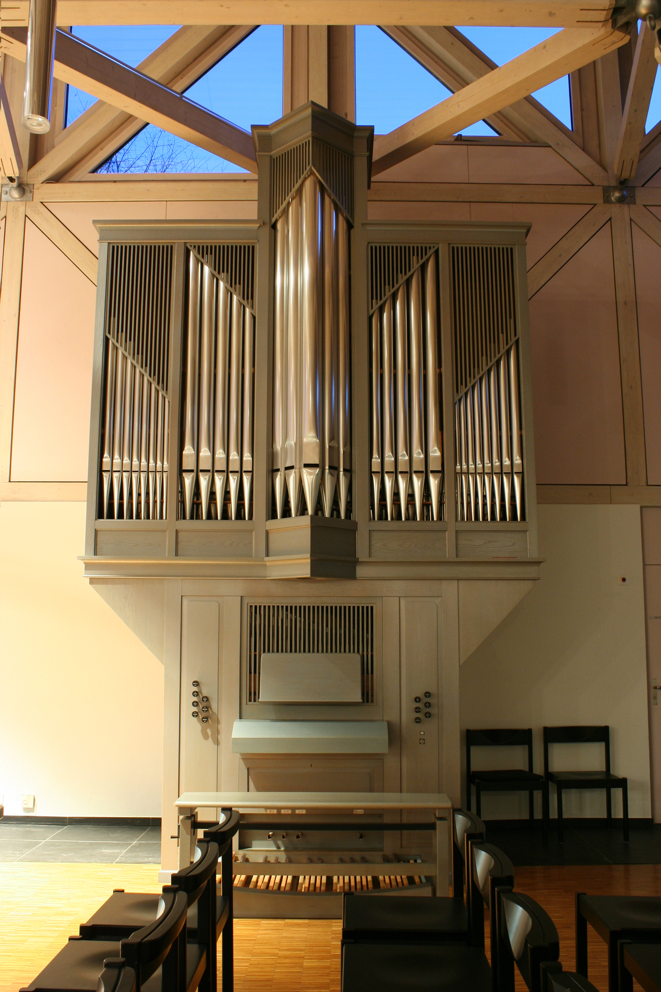 Römisch-katholische Kirche St. Katharina von Siena Fällanden, Kuhn-Orgel